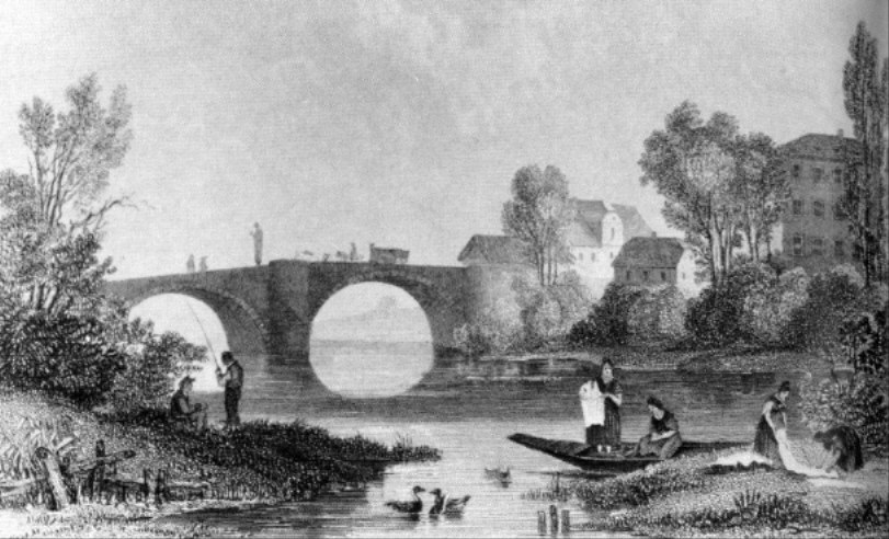 Wupperbrücke in Opladen. Stahlstich nach einer Zeichnung von Theodor Verhas (1811-1872).